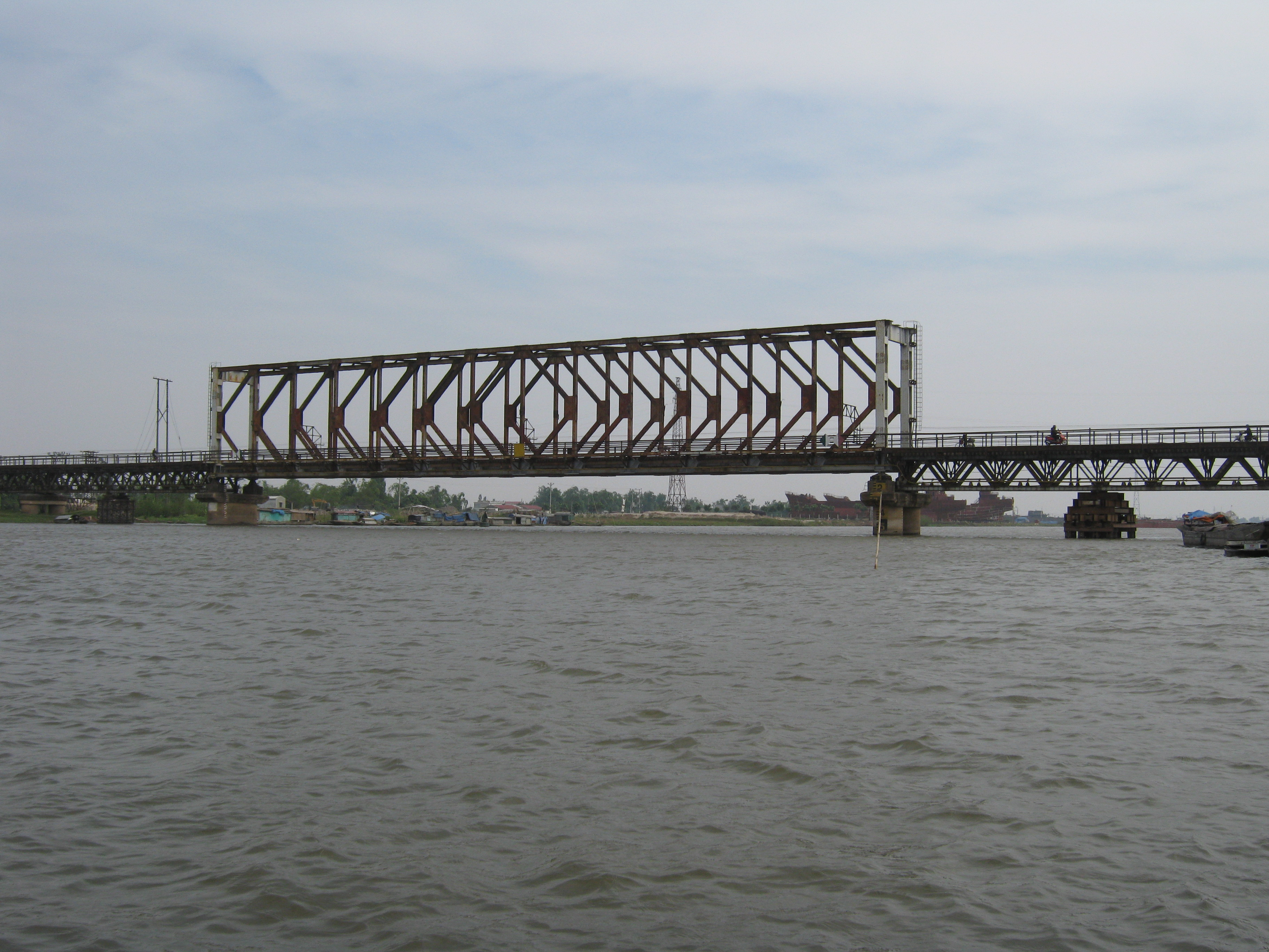 Cầu Non Nước sắt nhìn từ Dục Thúy Sơn ở thành phố Ninh Bình